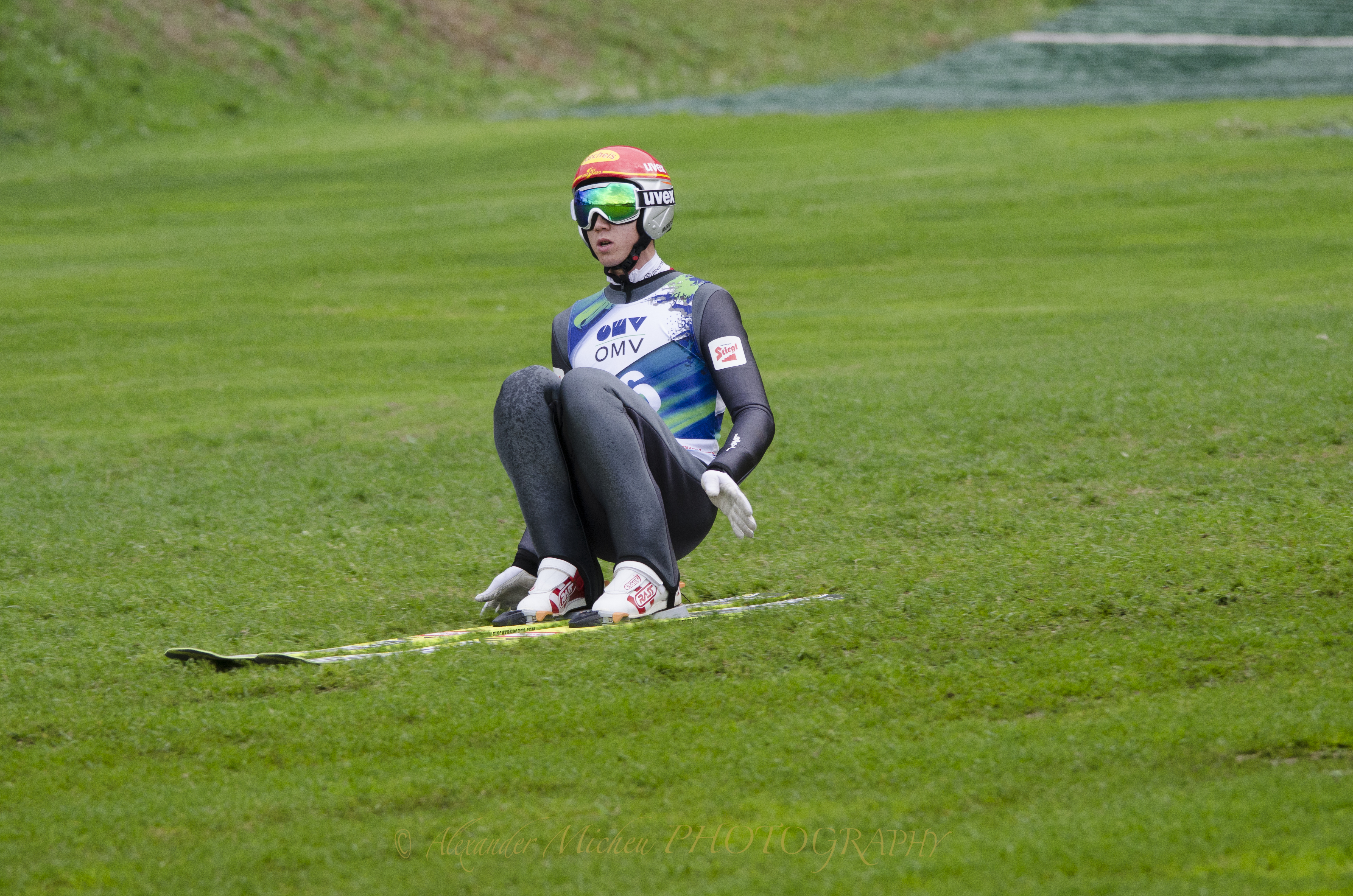 FIS Sommer Grand Prix Nordische Kombination 27. / 28. August 2013 Villach Möltschach